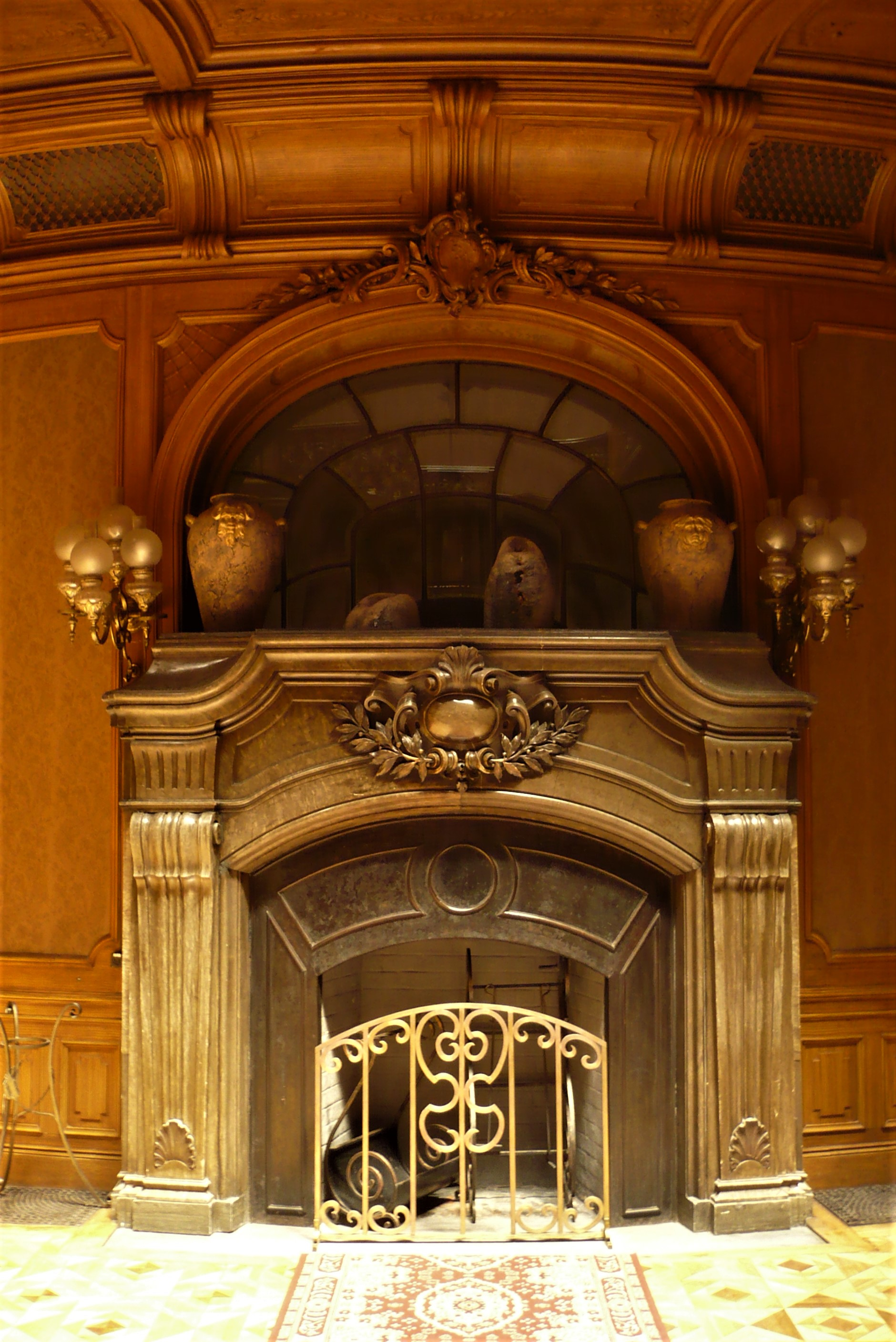 Kasyno Szlacheckie we Lwowie